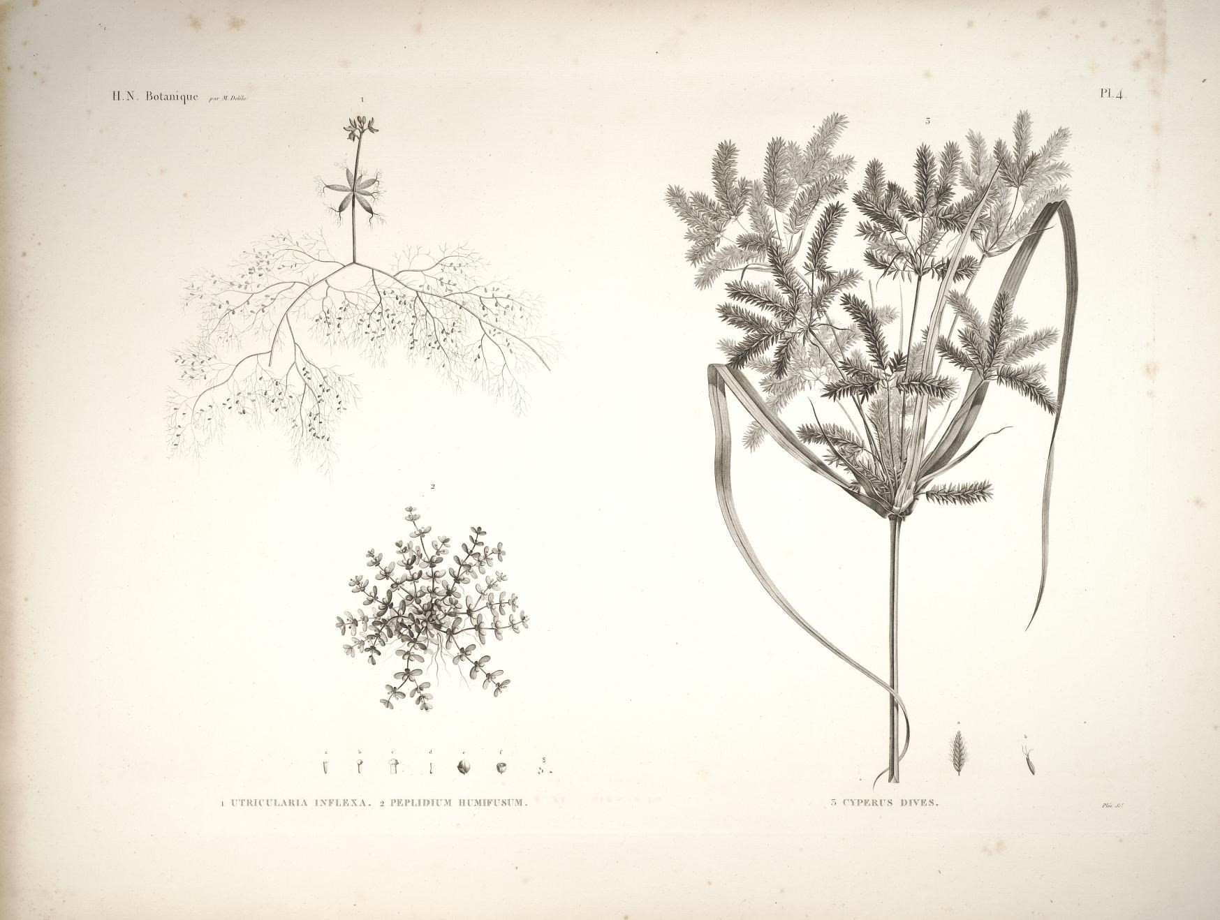 j \ II.N^. Bolainquc l^xir M.. Del (le/ 1 PI. 4 . ^ / j V J T r 1 , ' X ,1 2 s r y \ - - / a "b t. f ?xm' 1 (T O ■^'■S 'f ^ ■ ■y / -\ I- \ \ r / \ -^ 1 UTRICULARIA liVFI,EXA 2 PE"?LIDI"UM UMIFUw^rAf / ô CYPJLRFS DIVBS \ J'iJe Sri i / \ V